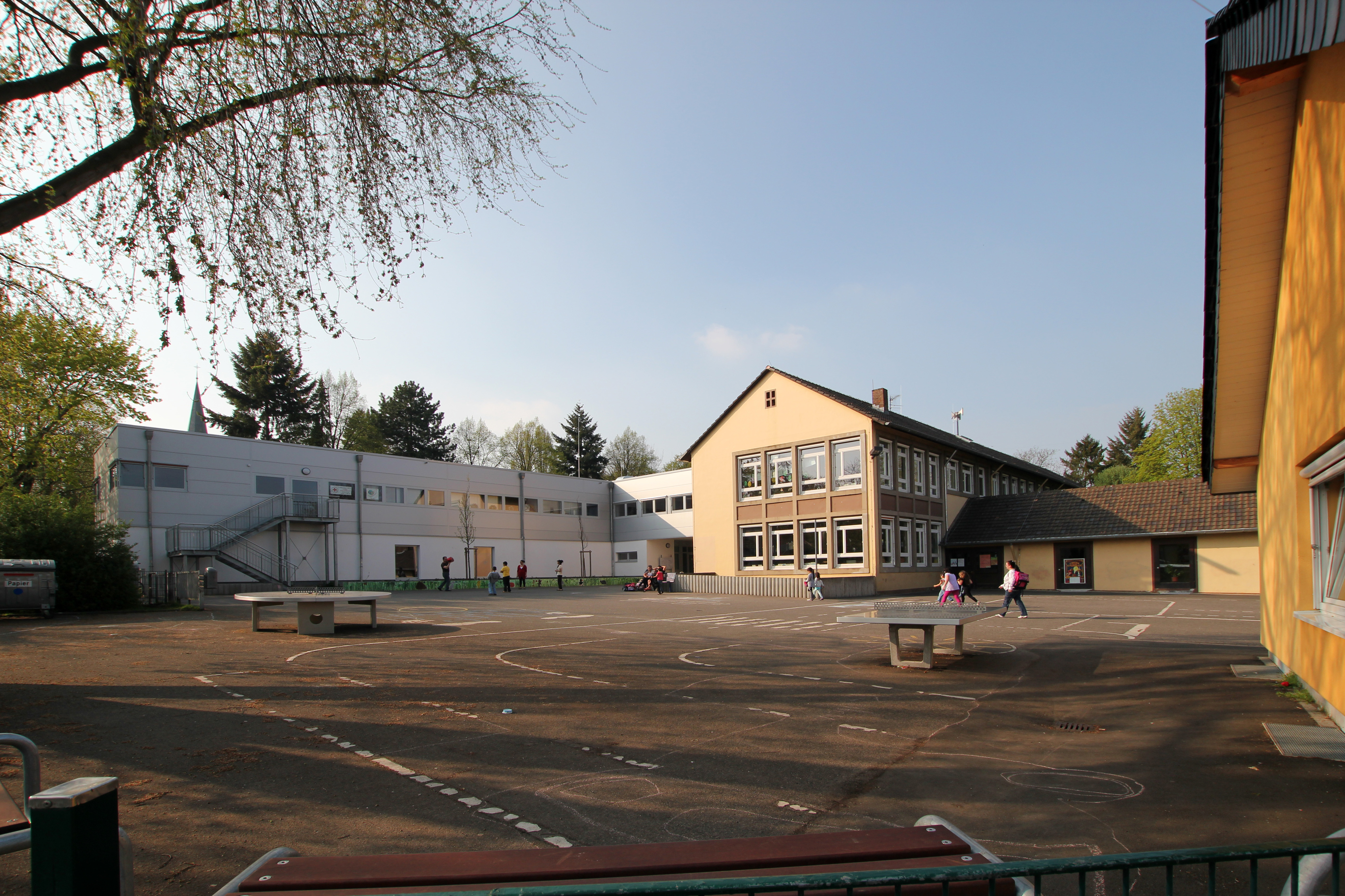 Brühl-Vochem, städtische Katholische Grundschule